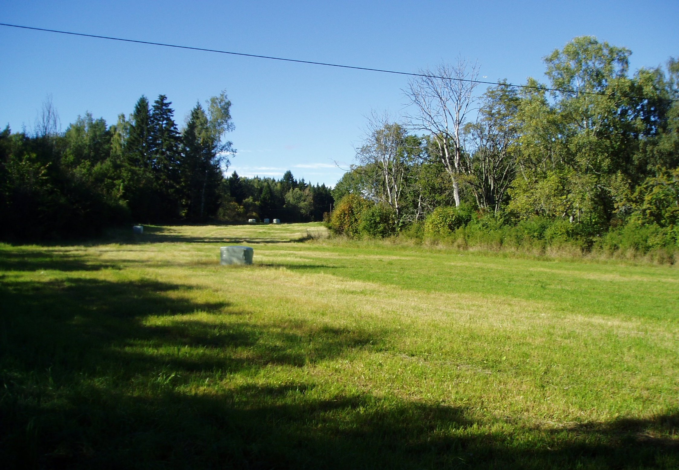 Sättra naturreservat, äng